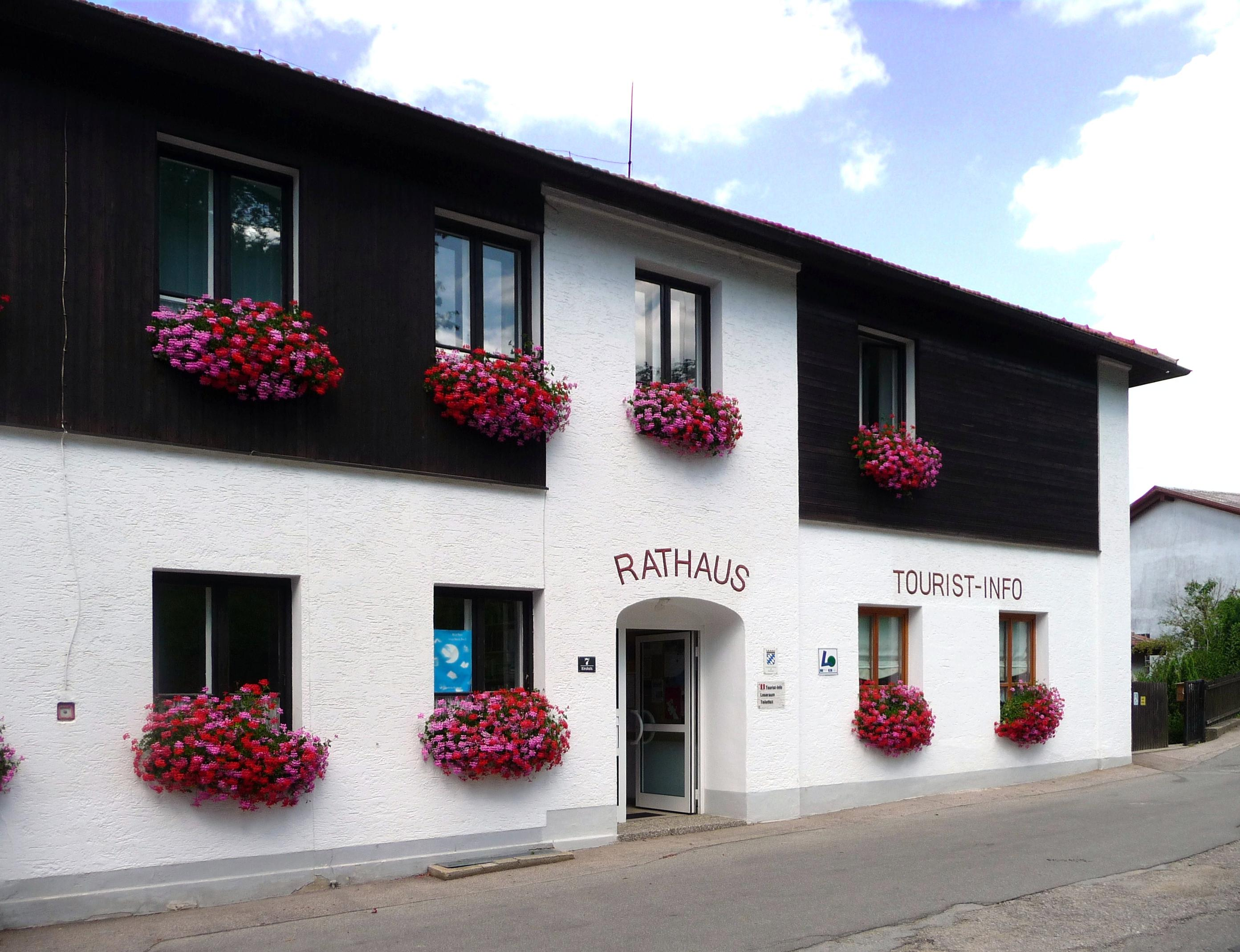 Das Rathaus von Hohenwarth